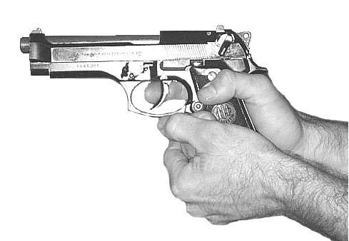 Pistol M9 (Beretta 92F) Palm Supported Grip